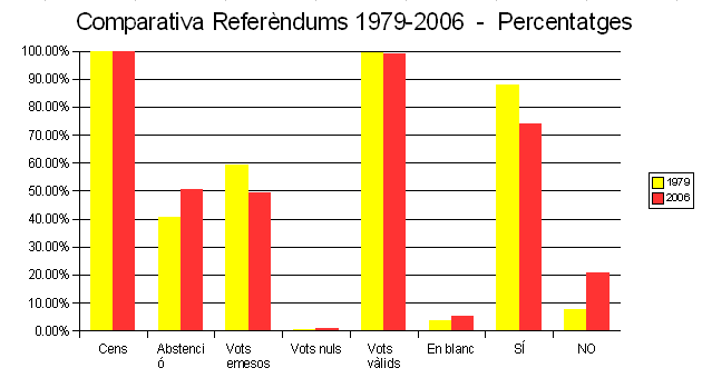 Comparativa referèndum estatut 1979-2006 - percentatges